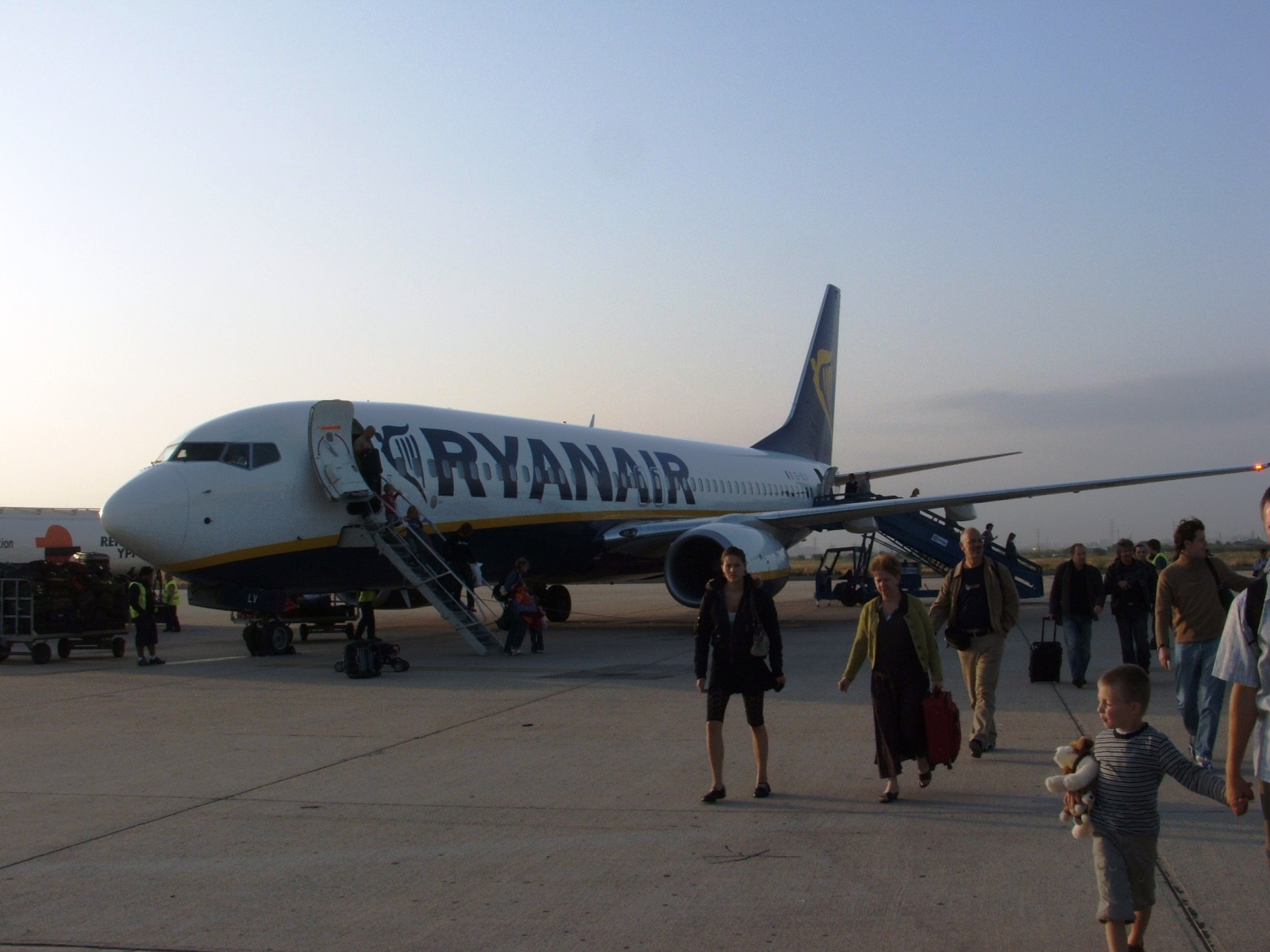 Ryanair lėktuvas Reuso oro uoste